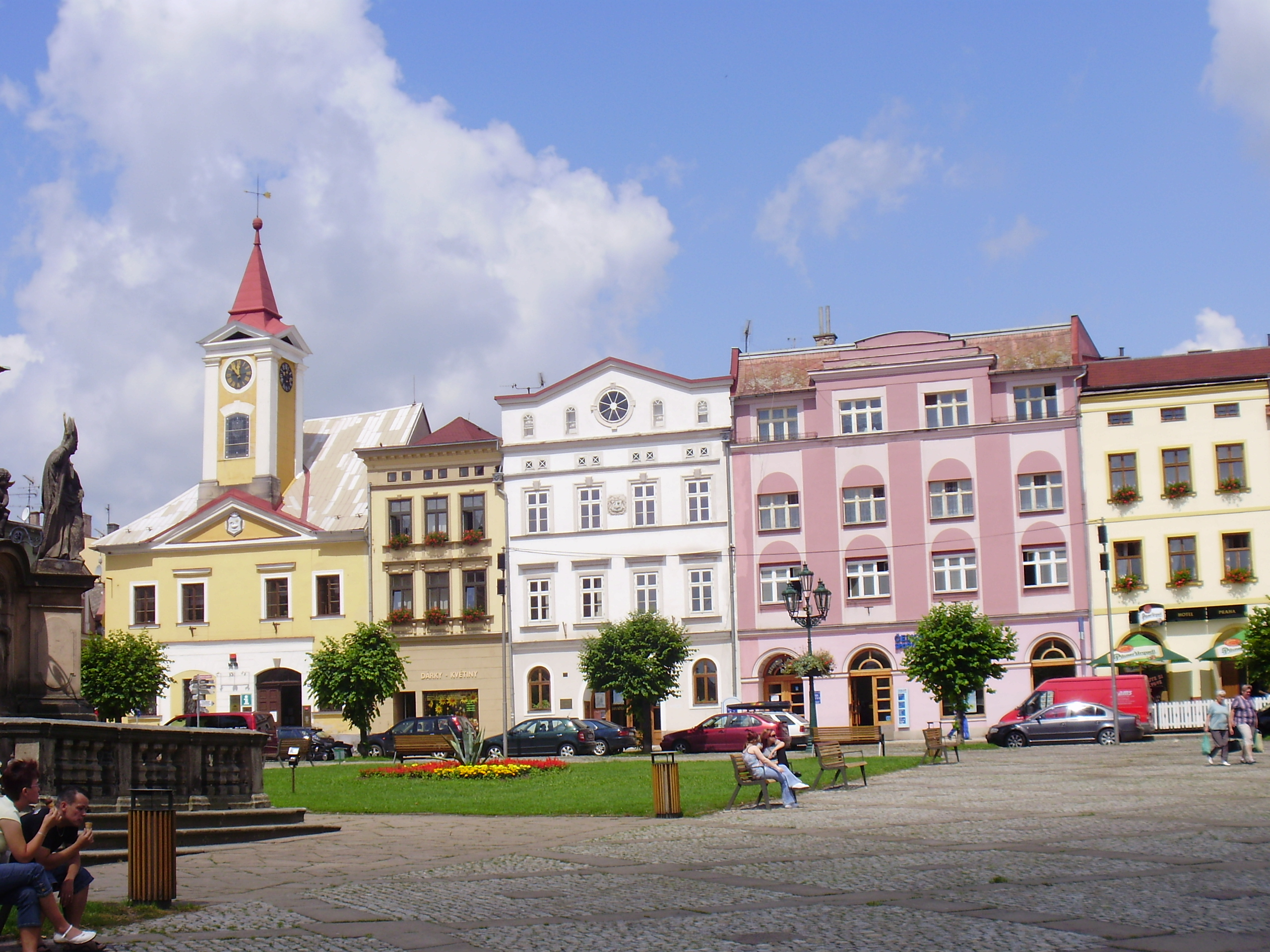 square Broumov